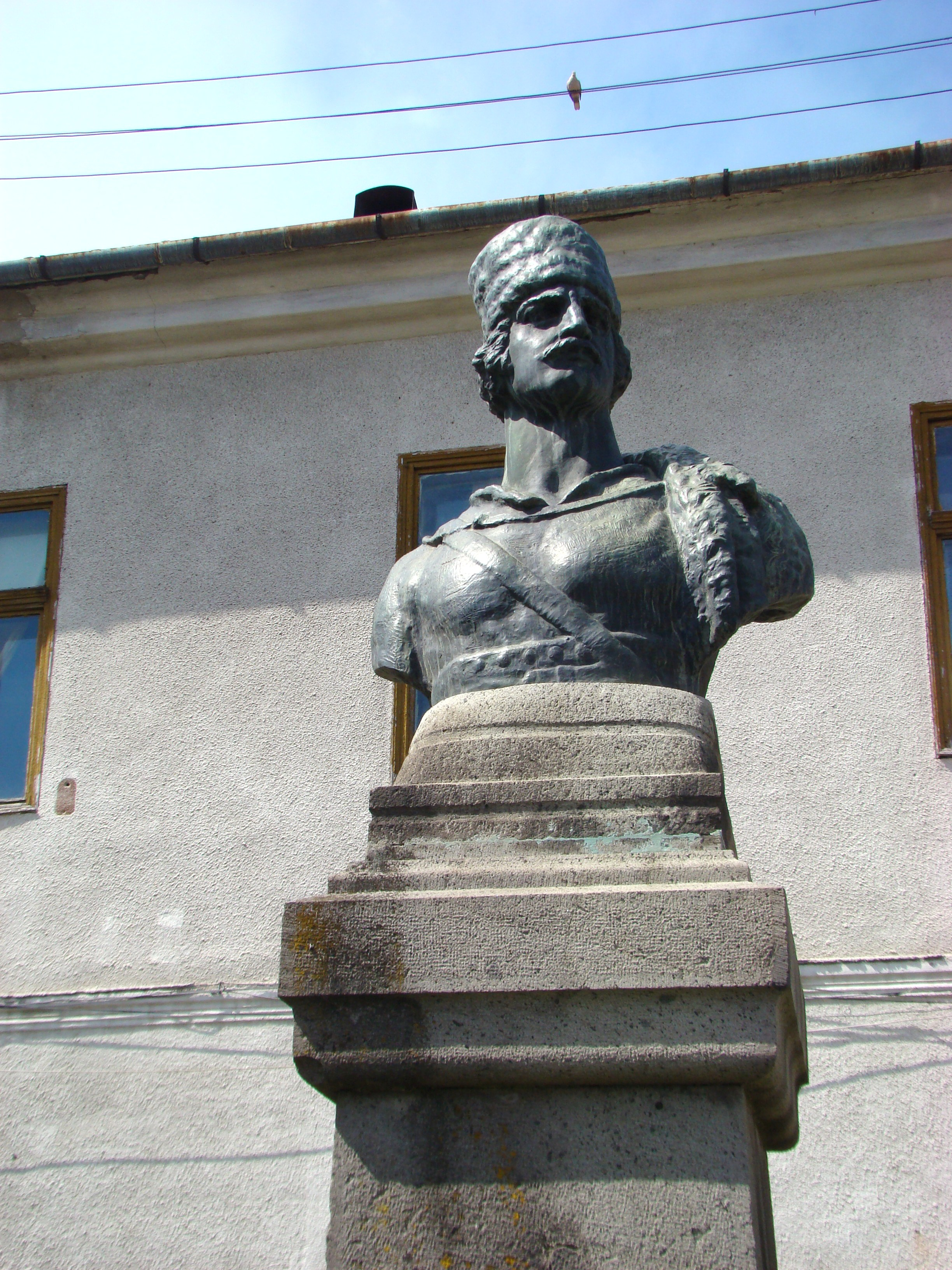 Bustul lui Avram Iancu, sat BAIA DE CRIŞ; comuna BAIA DE CRIŞ